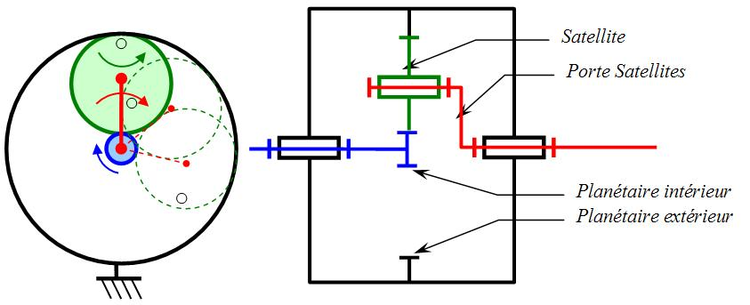 Schéma de principe d'un réducteur épicycloïdal Réalisé sous Word. Illustration de cours de sciences de l'ingénieur.